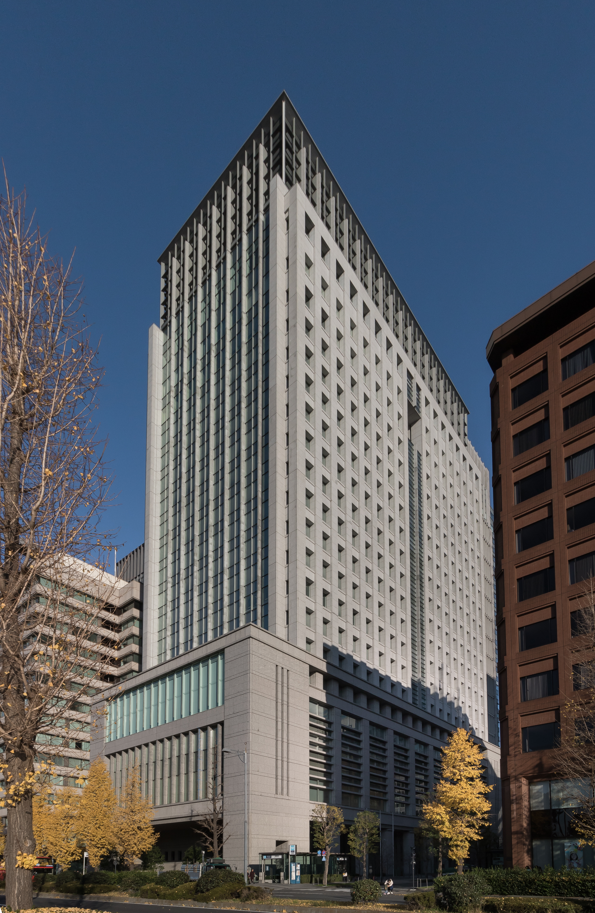 三菱商事ビルディング(三菱商事本社)